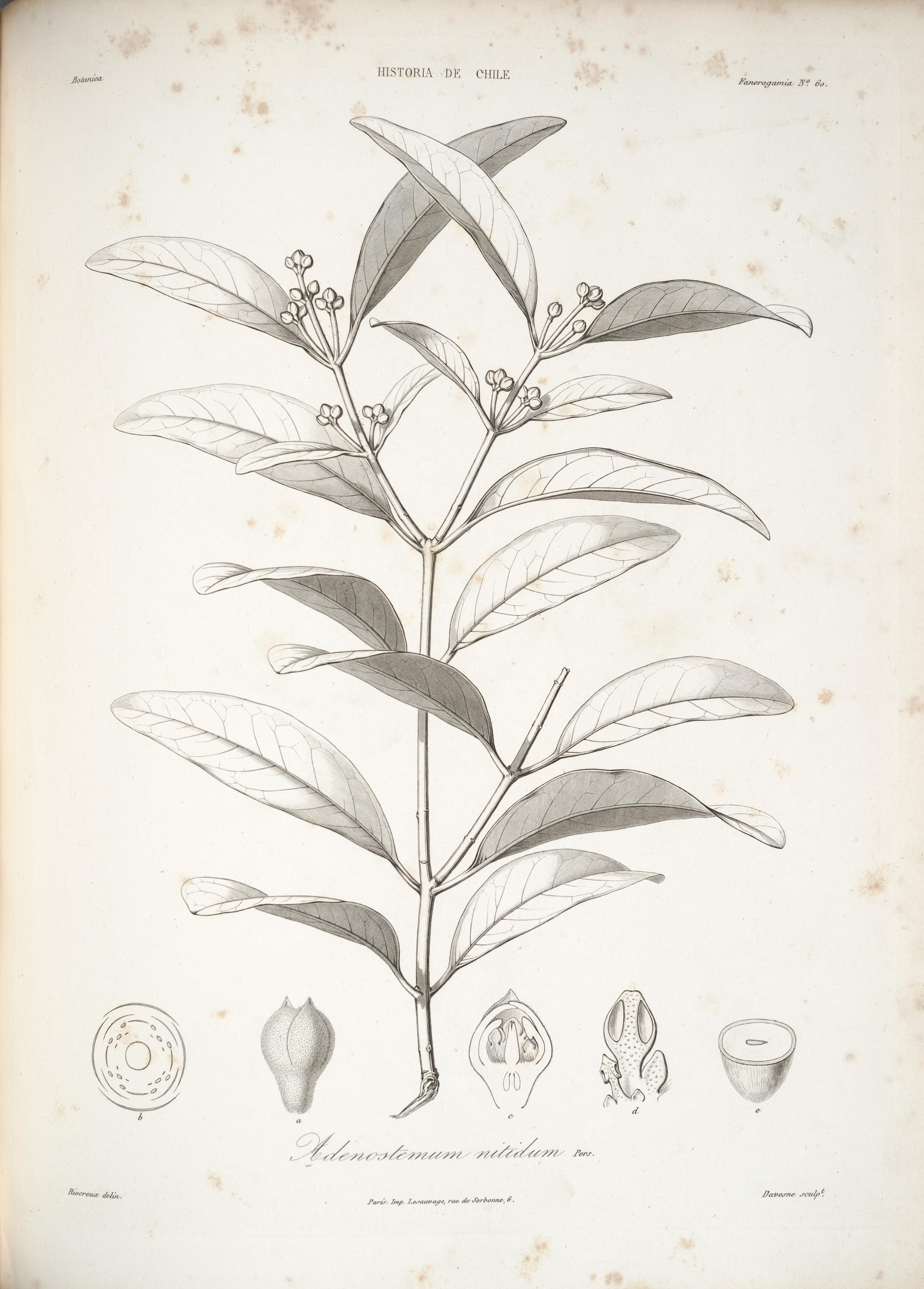 Adenostemum nitidum (Ruiz & Pav.) Pers. = Gomortega keule (Molina) Baill.